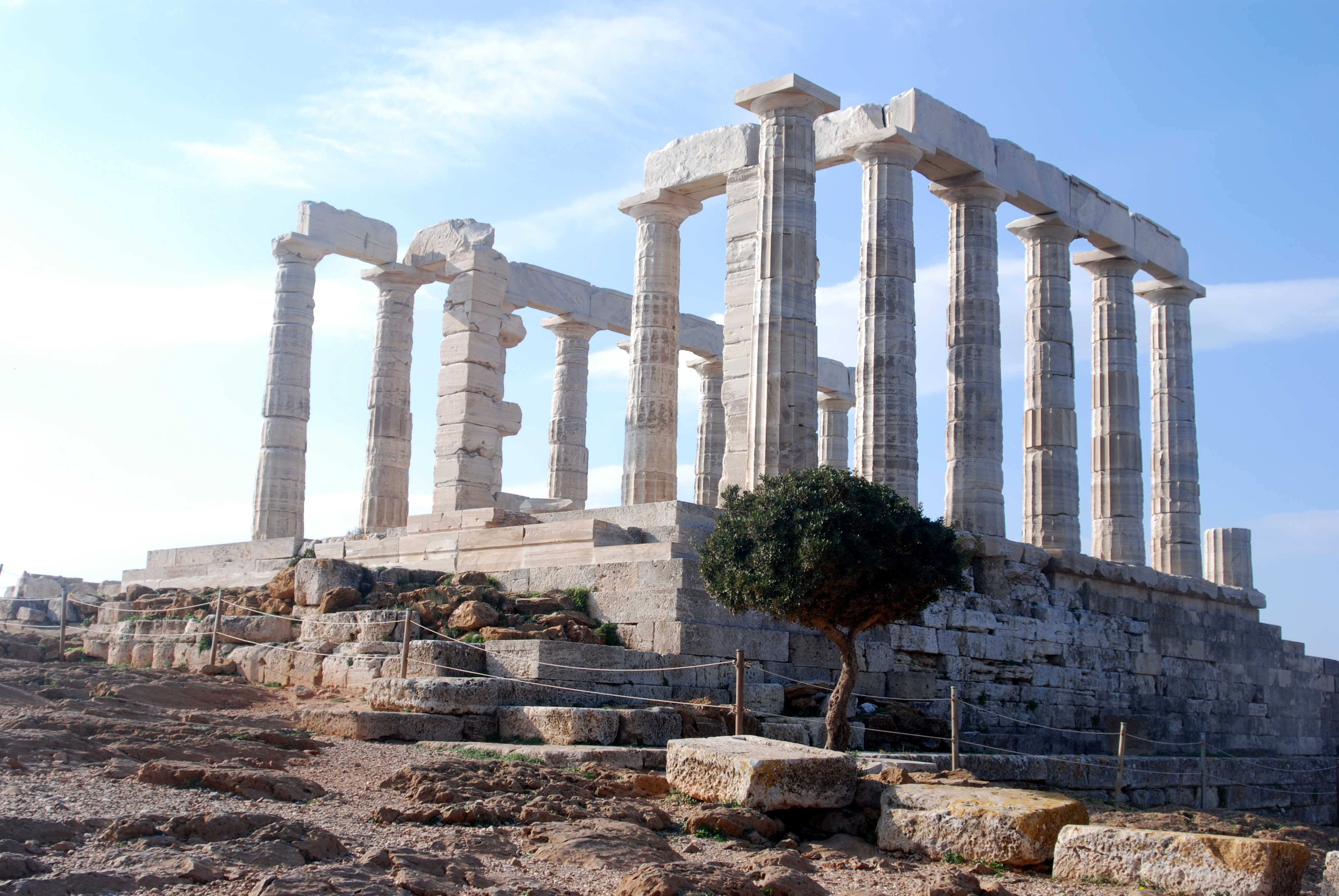 El cabo de Sunión o Sunio, en latín conocido como Sunium (en griego antiguo Σούνιον) está localizado a 65 km al sureste de Atenas, en el Ática. En la antigüedad, el promontorio fue usado para divisar a los barcos que se acercaban a Atenas antes de que arribaran. Las ruinas del templo de Poseidón, construido en el siglo V a. C. sobre las ruinas de un templo construido en el periodo arcaico, están encaramada sobre el mar a una altura de casi 60 metros.